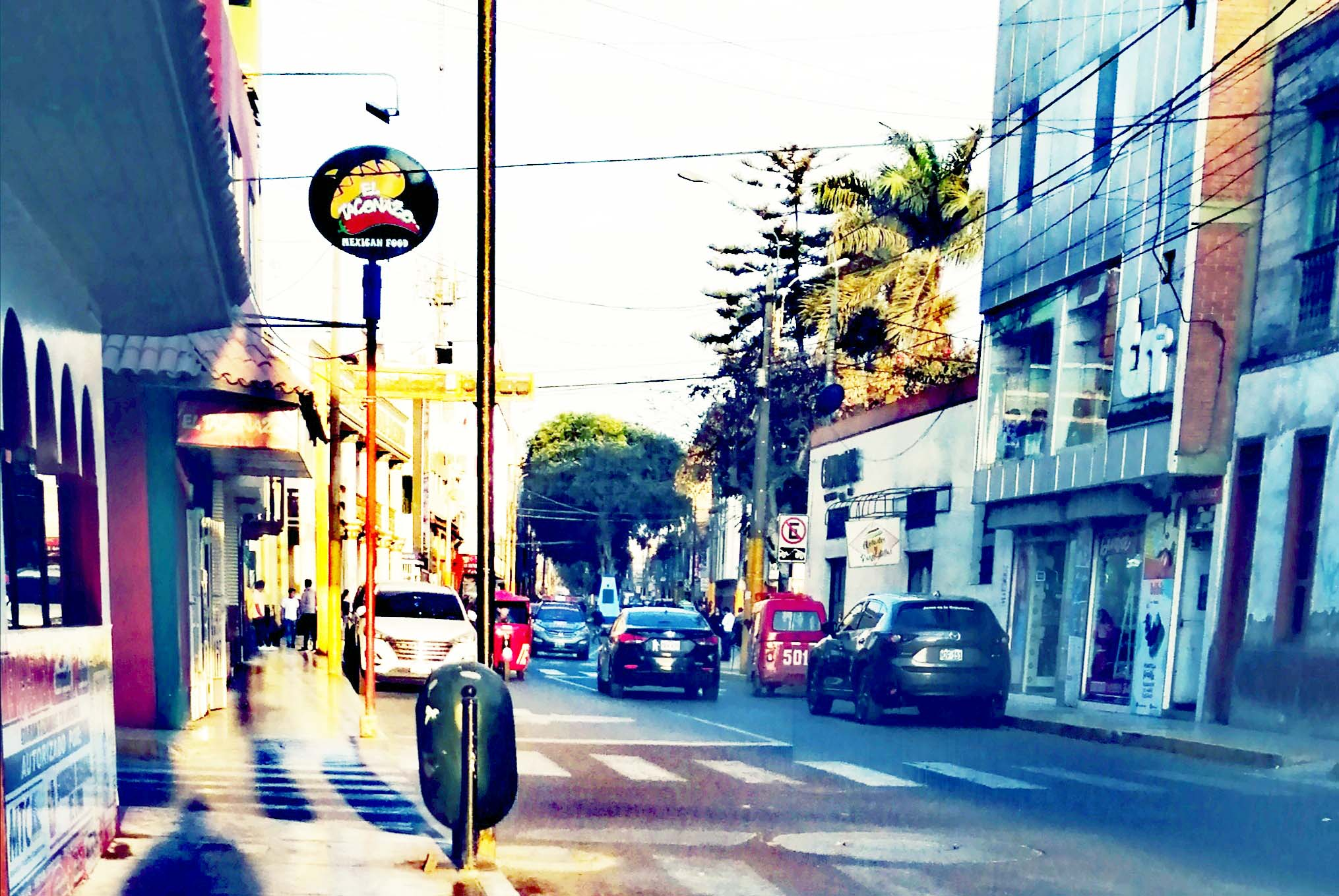 Calle Colón en Huacho.